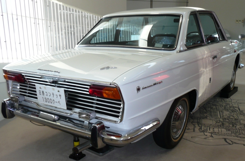 Hino Contessa 1300 Coupe rear.